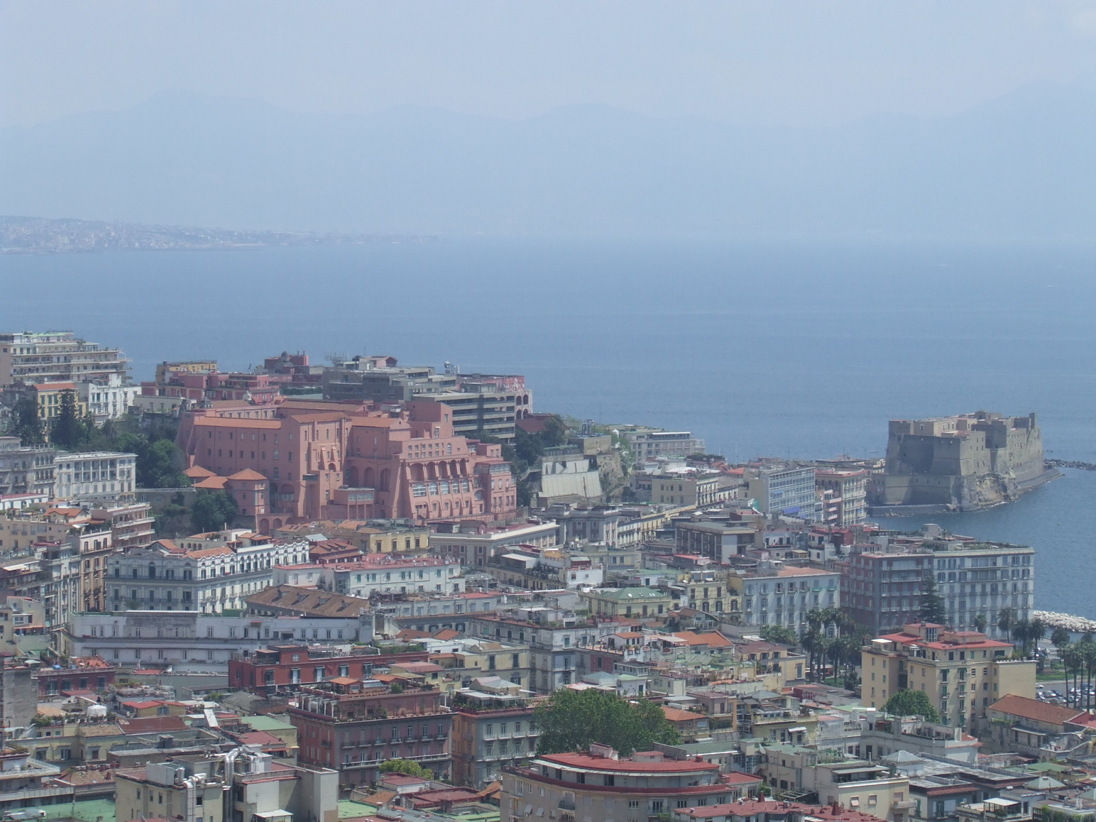 Complesso della Nunziatella - Castel dell'Ovo Vista dal Corso Vittorio Emanuele